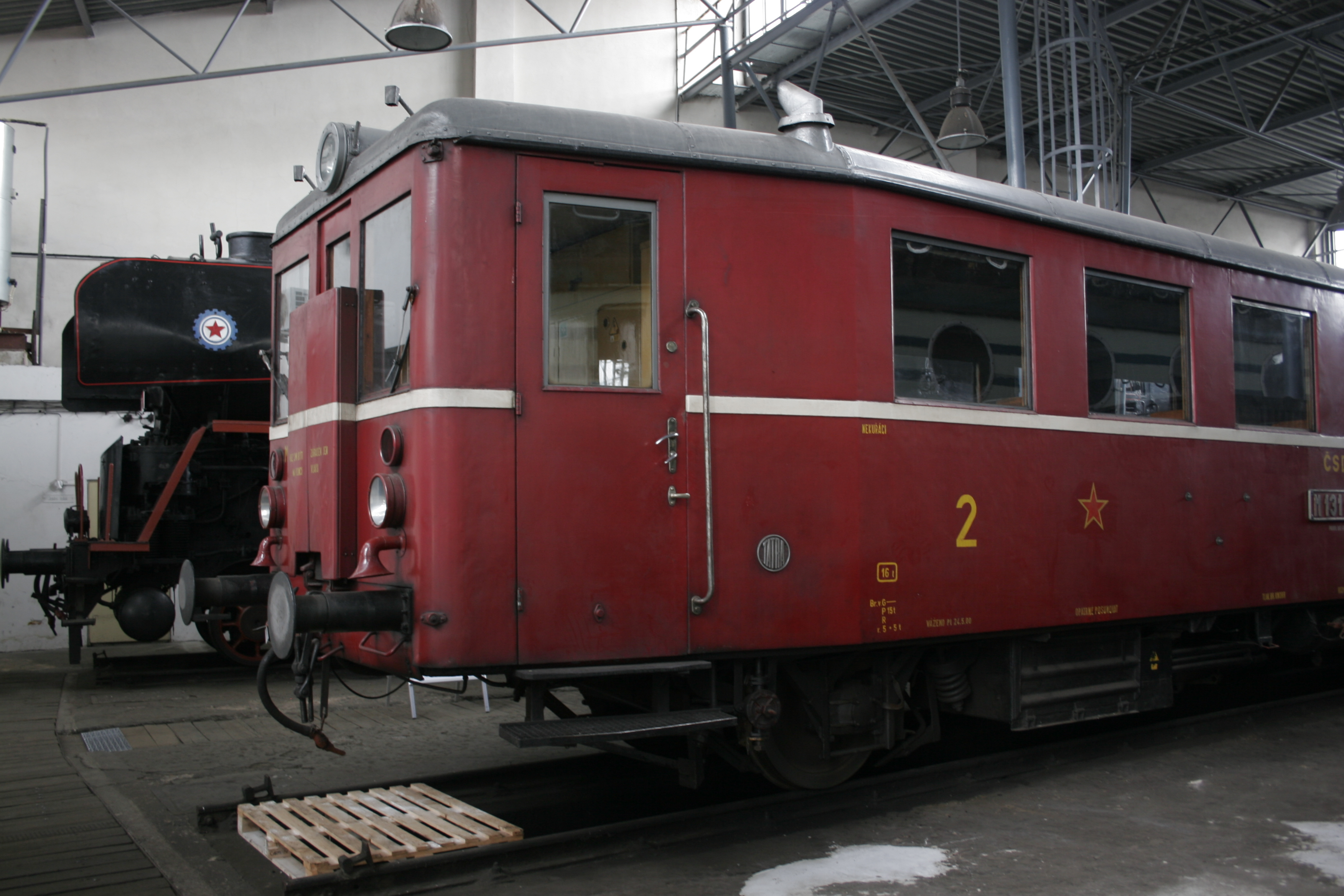 Motorový vůz M 131.1405 "Hurvínek" z roku 1955 v depozitáři Národního technického muzea Chomutov, Česká republika.